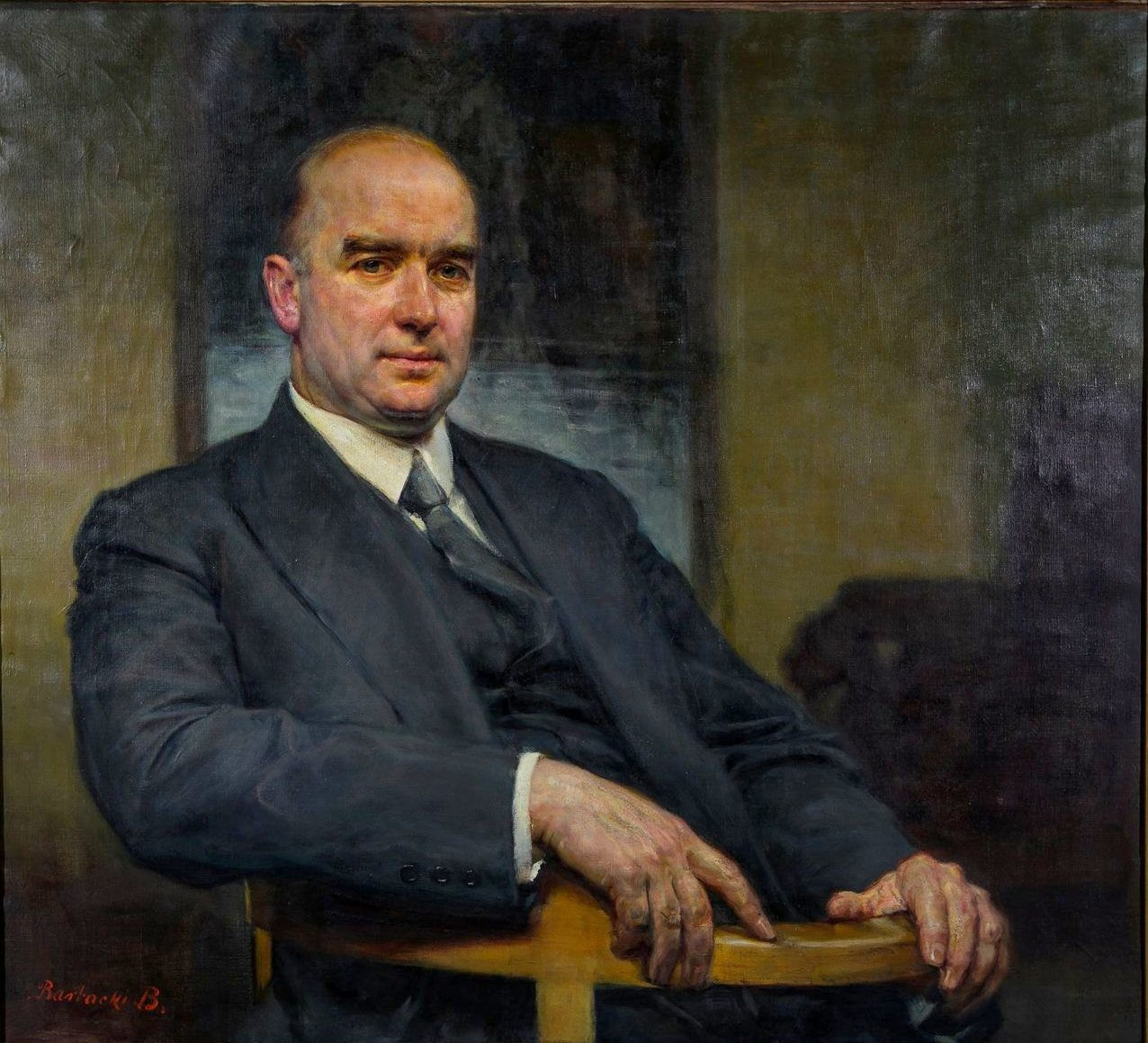 dr Włodzimierz Koskowski, 1937 wykładowca Uniwersytetu Jana Kazimierza we Lwowie